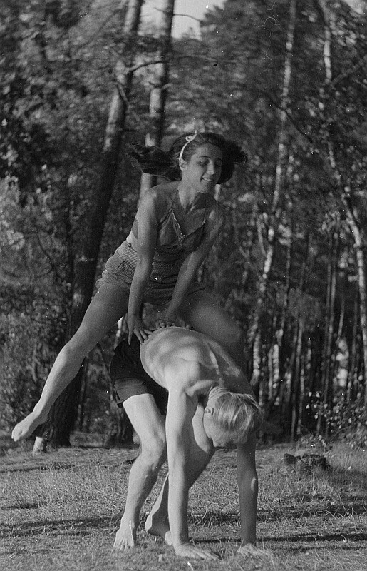 Original image description from the Deutsche FotothekBockspringen